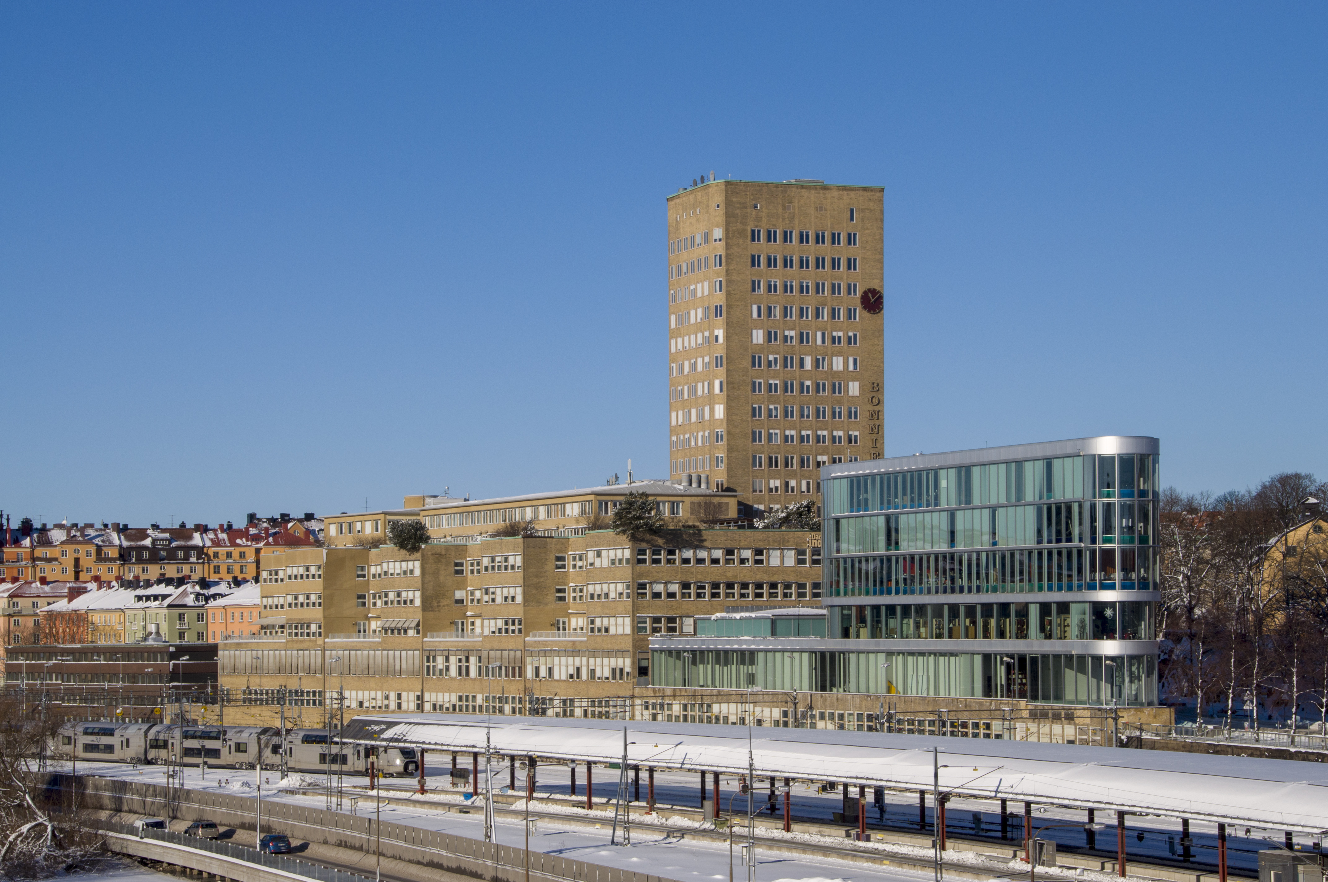 Bonnierhuset LOKSTALLET 7,Lokstallsgatan 1-9, Torsgatan 21, Nybyggnadsår 1946 - 1949, lbert Bonnier (Byggherre) Anders Tengbom (Arkitekt) Ivar Tengbom (Arkitekt) Olle Engkvist (Byggmästare)